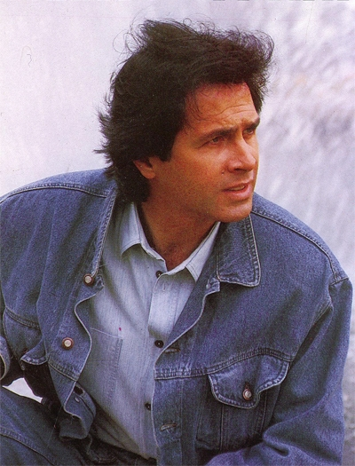 Alex Damiani. Tratto dal sito (sito ufficiale del cantante e attore). Autorizzazione fornita direttamente dall'interessato.